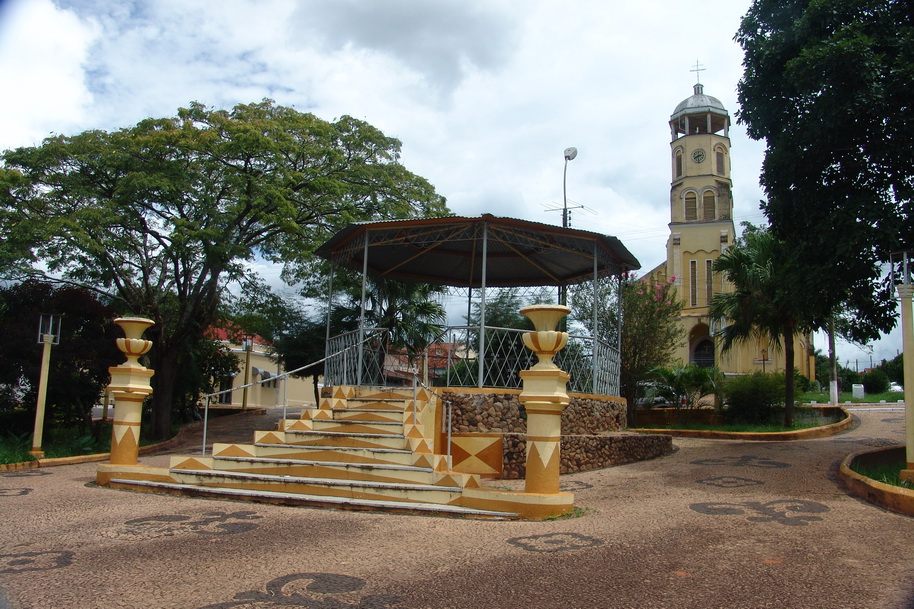 Imagem do município de Cabrália, estado de São Paulo, Brasil.